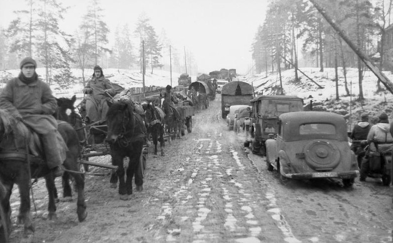 Scherl: Auf einer Verbindungsstraße zwischen Ilmensee und Finnischem Meerbusen Im Zuge der Frontverkürzung gehen Einheiten in planmäßiger Ordnung in die ihnen neu zugewiesenen Stellungen. Achtung! PK-Aufnahme Kriegsberichter Reimers 28.2.44 [Herausgabedatum] Zentralbild: II. Weltkrieg 1939-45 An der Front in der Sowjetunion. Ende Februar 1944. Bei der sowjetischen Offensive zur Befreiung des Leningrader Gebietes Januar-März 1944 räumen die deutschen Truppen das ganze Gebiet zwischen Ilmensee und Finnischem Meerbusen bis zum Peipus-See.